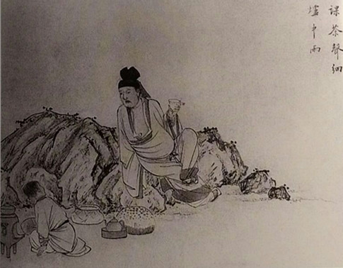 清 蕭晨 禪隱圖冊頁之八